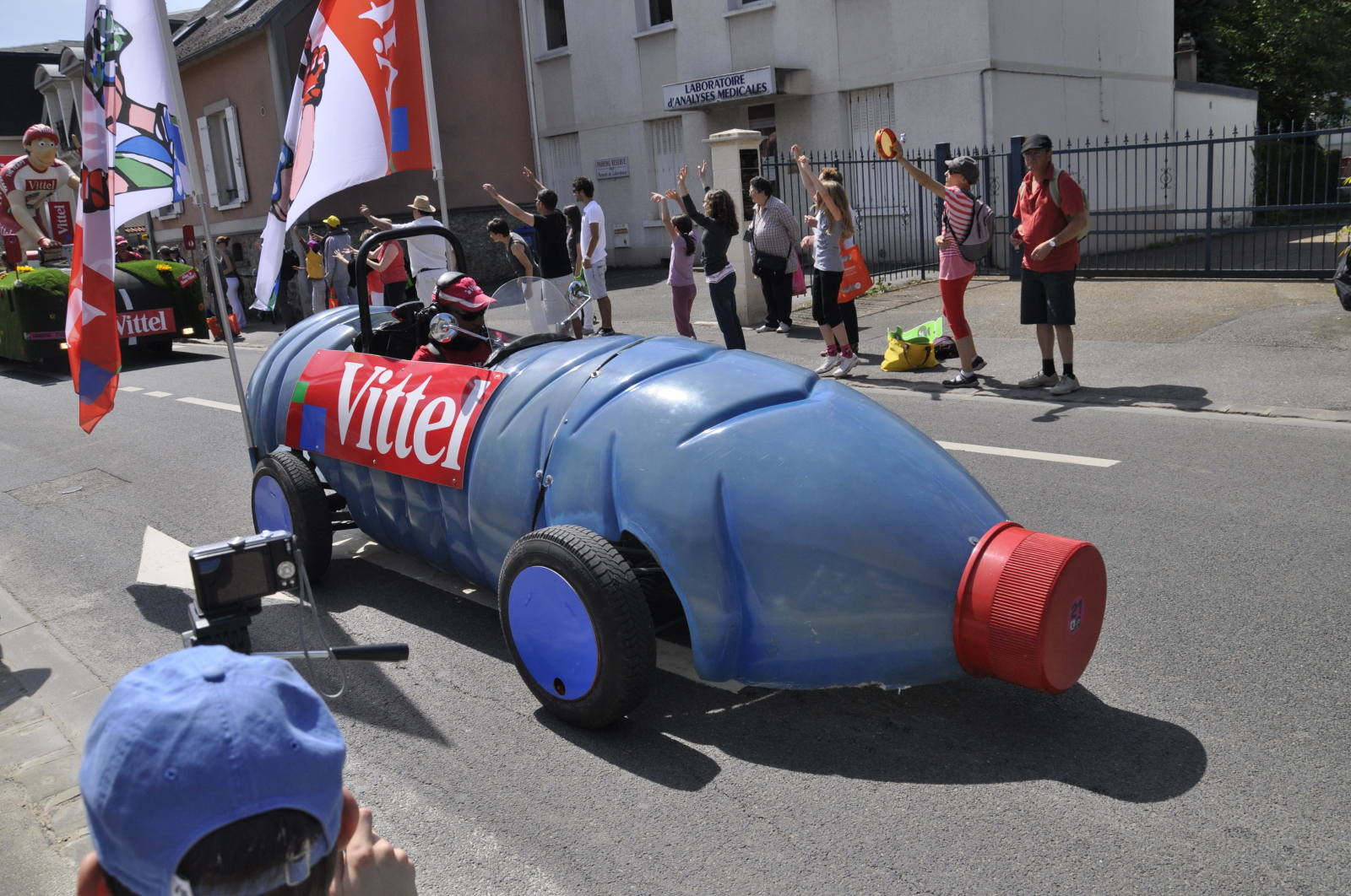 Véhicule Vittel.